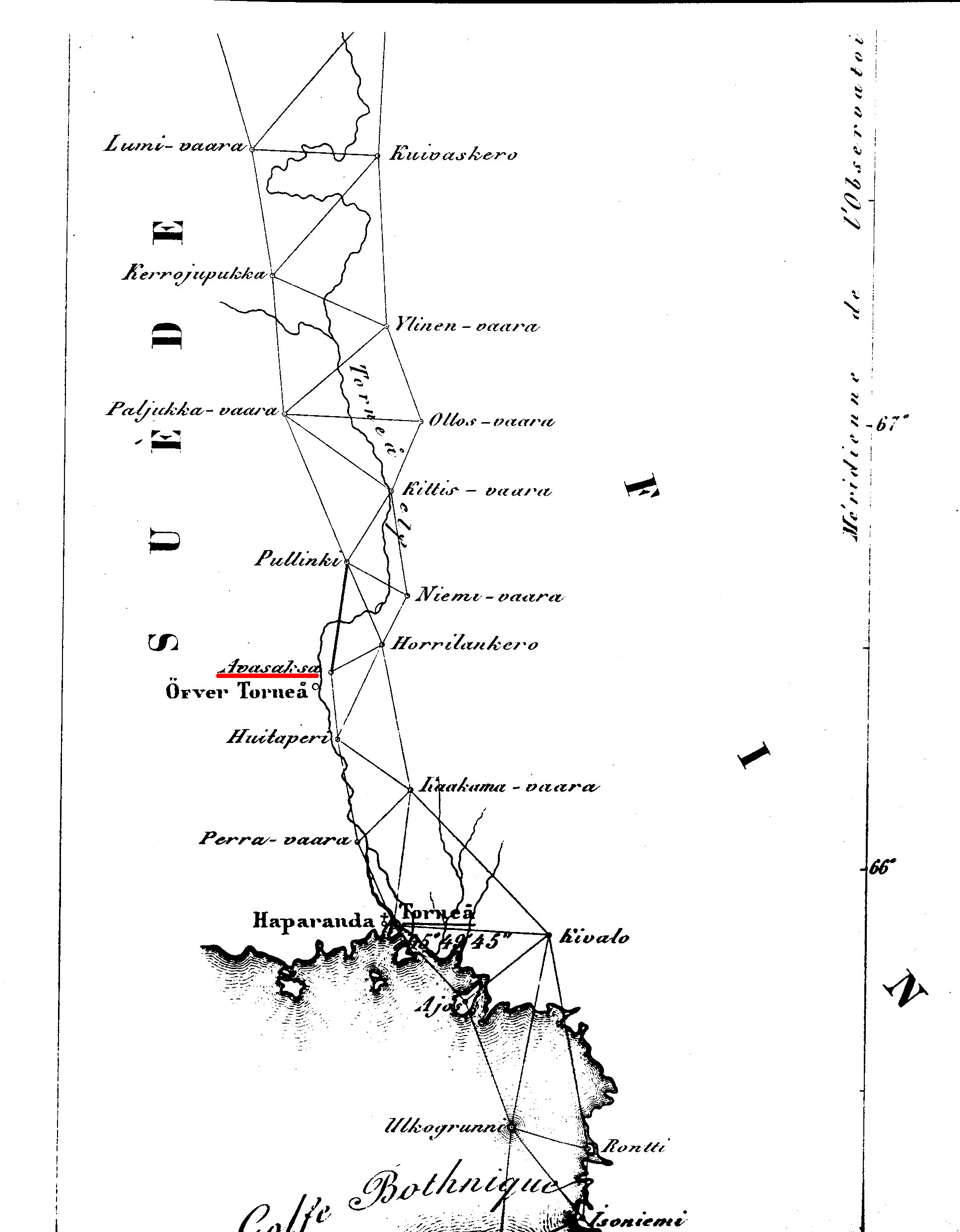 Carte du réseau de triangulation de l'arc de Struve dans les environs de Tornio, avec Aavasaksa souligné en rouge